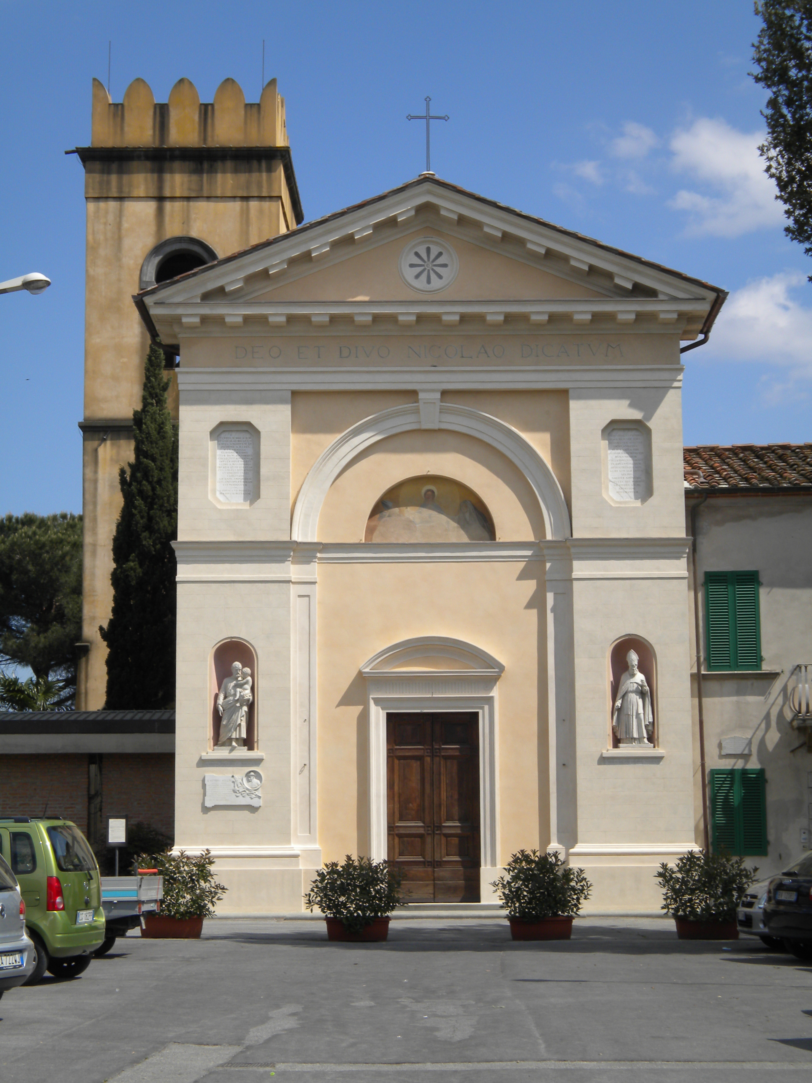 San Niccolo' Agliana